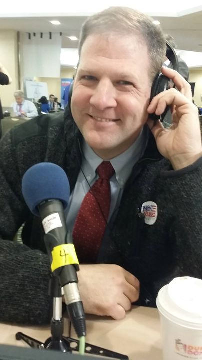 ift.tt/1SdWYoE